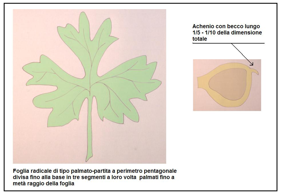 Ranunculus oreophilus